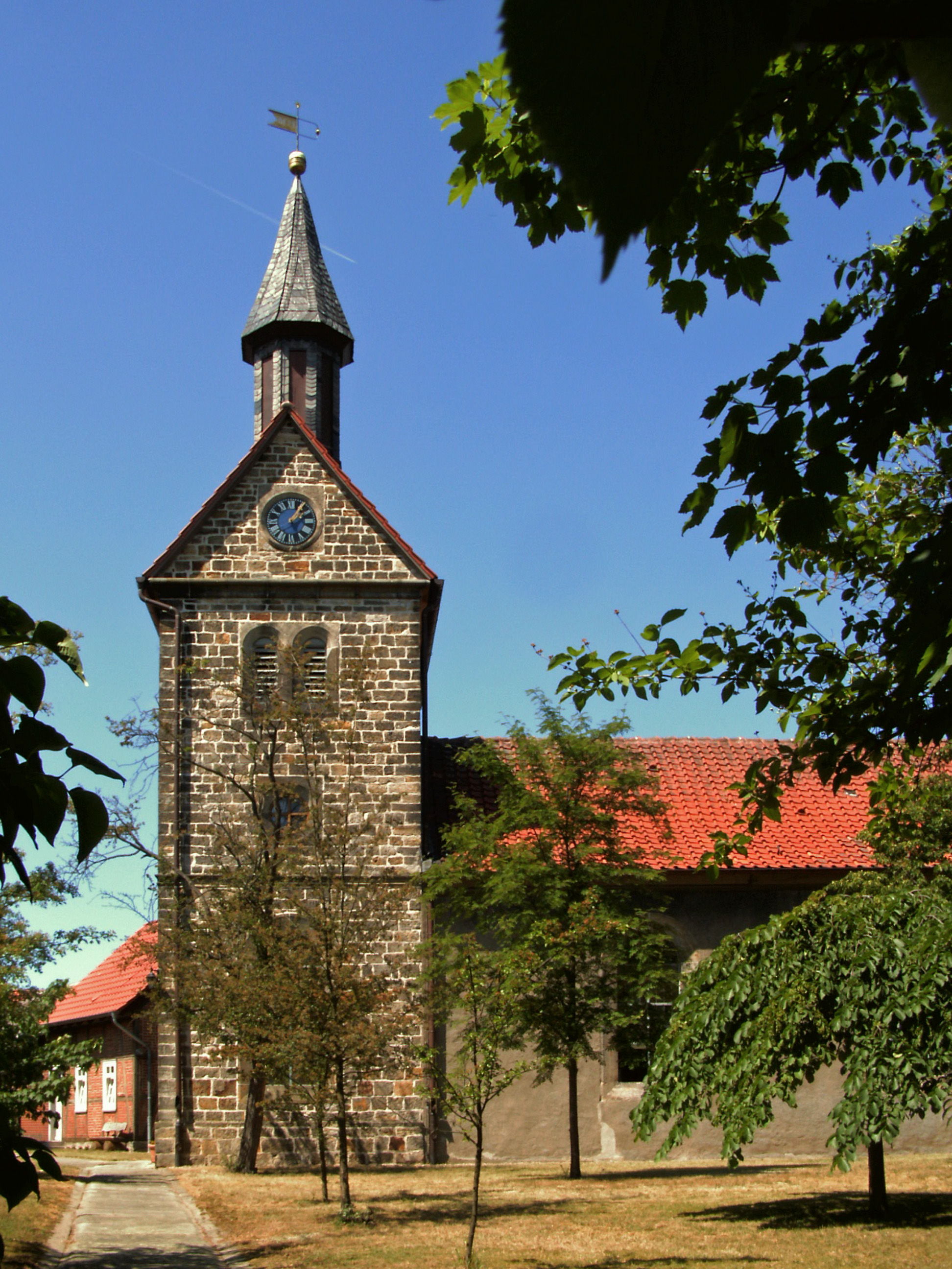 Evangelische Kirche in Mackendorf, Ortsteil von Bahrdorf.